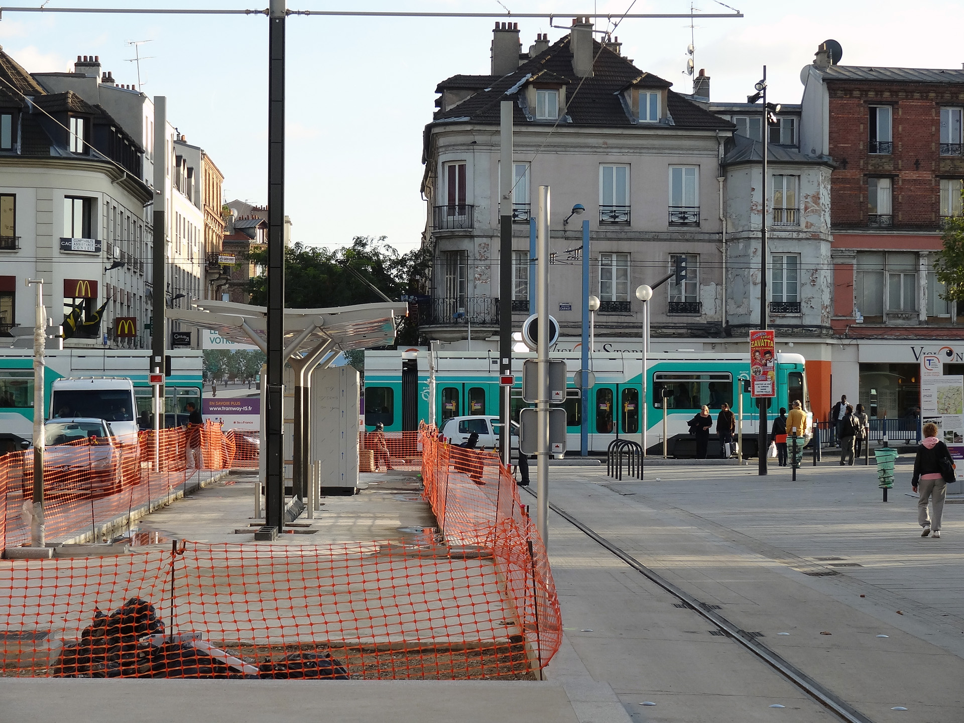 Station Marché de Saint-Denis (Saint-Denis, Seine-Saint-Denis). Au premier plan, la station du tramway T5, au fond une rame de T1 passe.